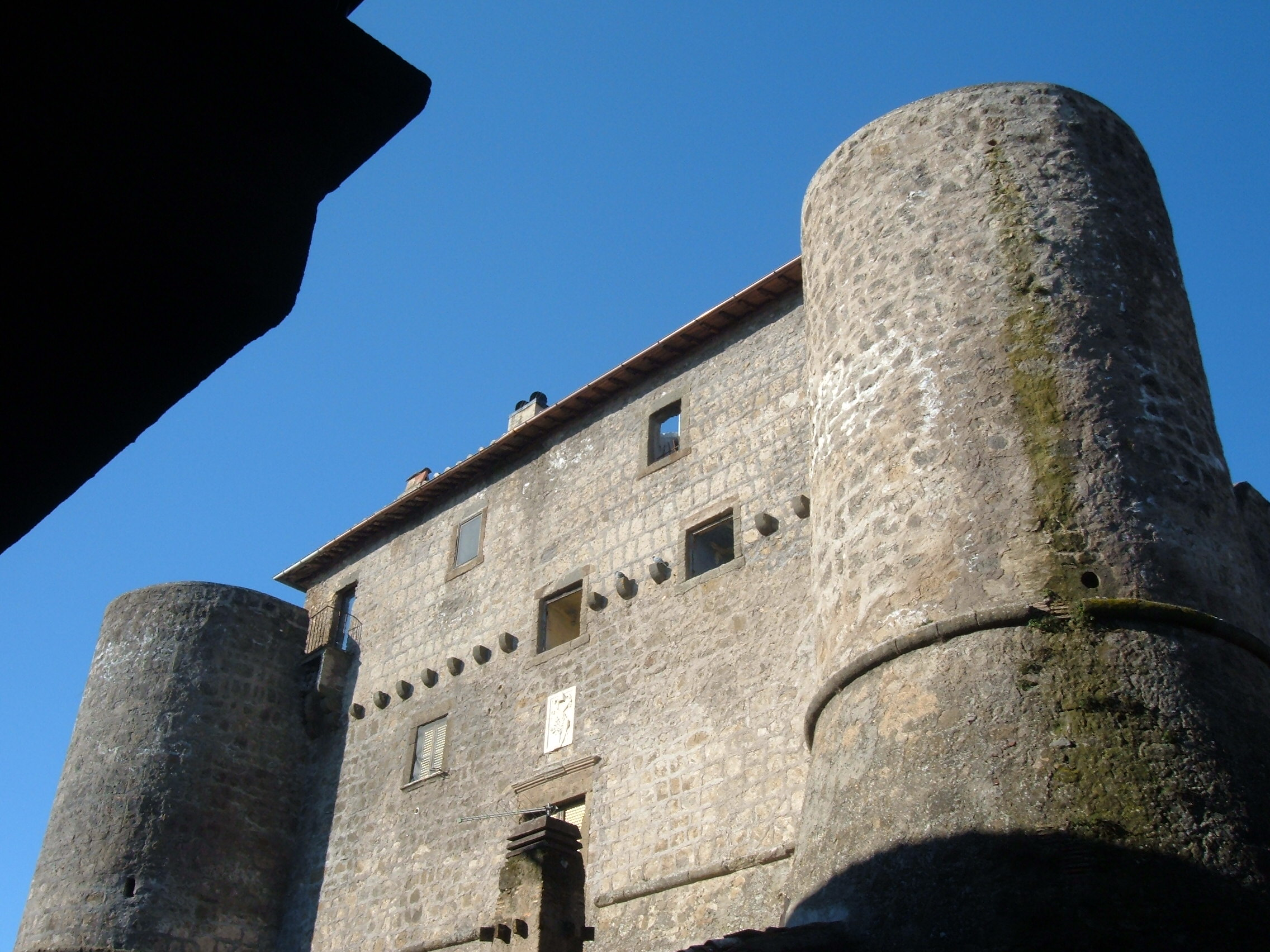 Ronciglione_-_Torrioni